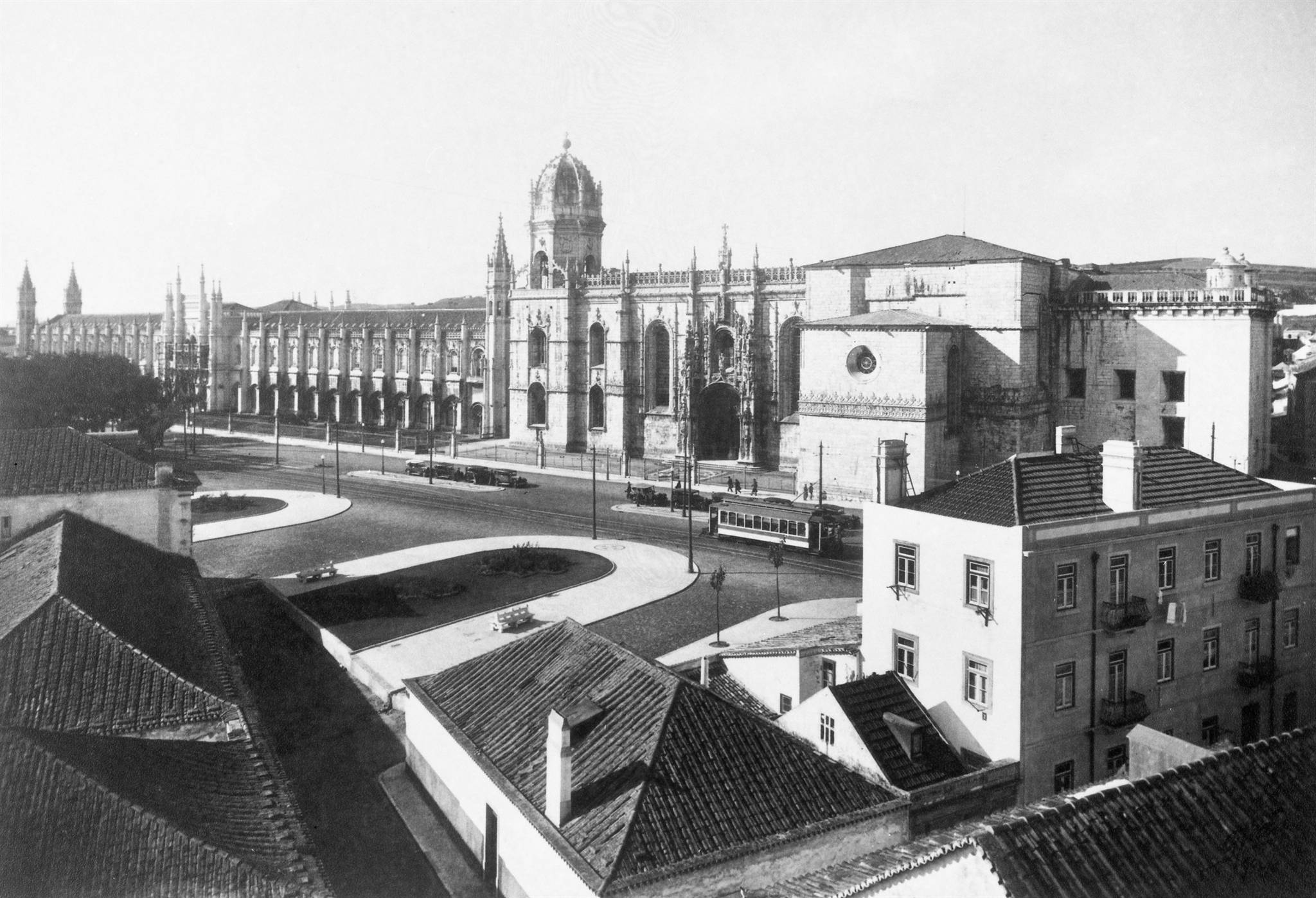 Tramoj en Portugalio